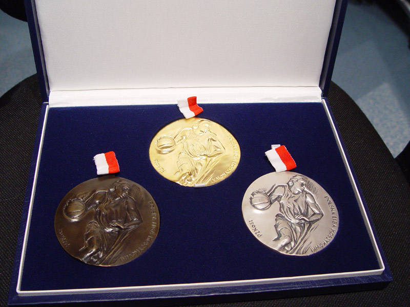 Polska Liga Koszykówki - zestaw medali